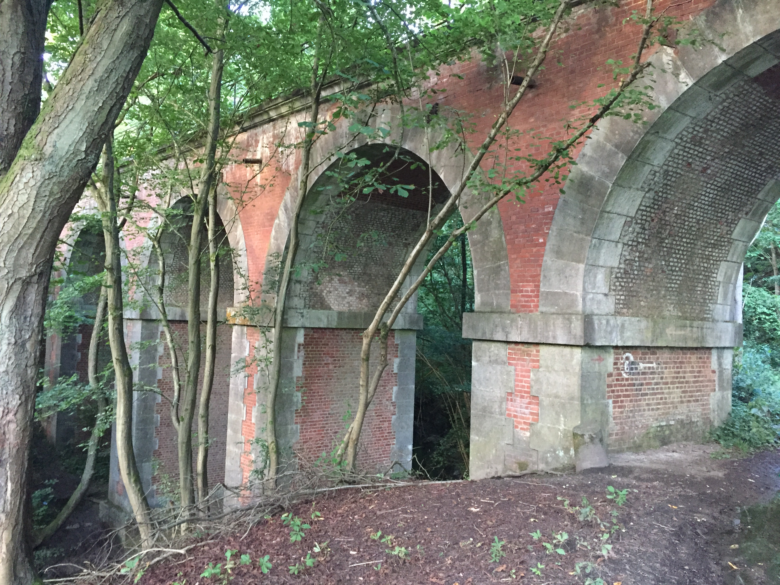 Les "Septs ponts" à Yves-Gomezée (Walcourt), situé au milieu des bois, accessible par un chemin de terre uniquement. Pont qui surplombe ce chemin et l'Yves (rivière).